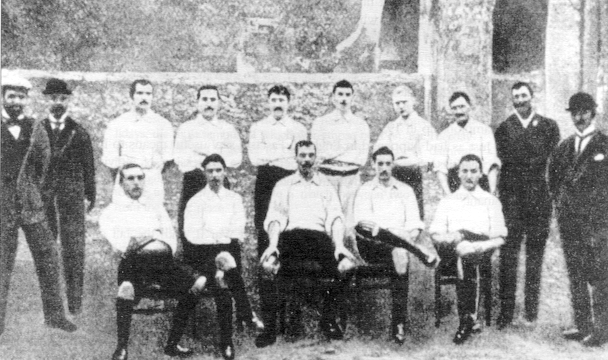 Foto storica della prima formazione del Genoa CFC, nel 1899. Da sinistra a destra: Ghigliotti, De Galleani, Spensley, Edoardo Pasteur, Leaver, Enrico Pasteur, Passadoro, Arkelss, Dapples, Deteindre e Agar.